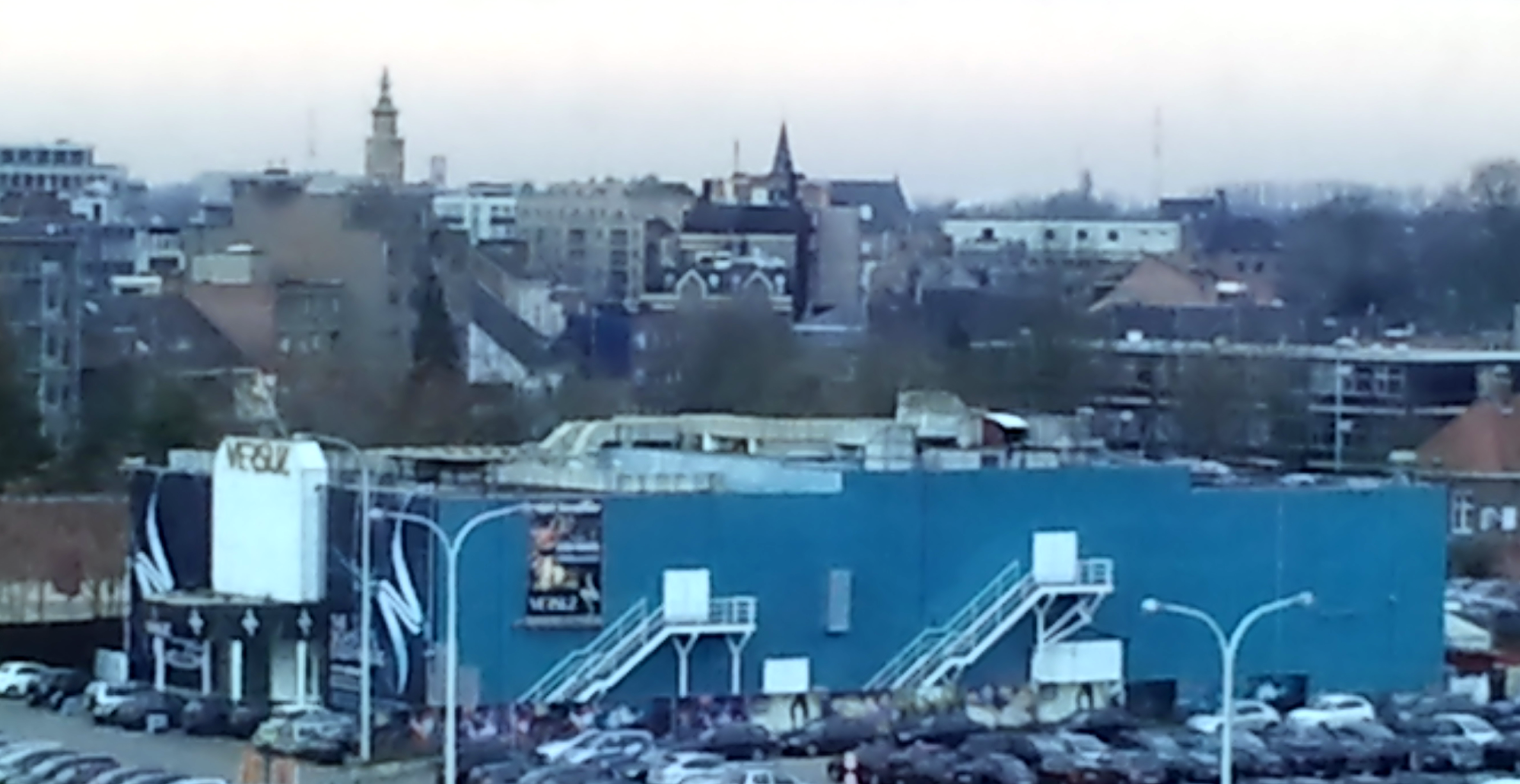 Discotheek Versuz te Hasselt, België. Foto genomen vanaf appartementencomplex 'De Kaai'.